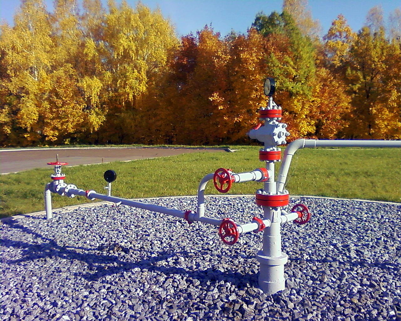 Скважина №1